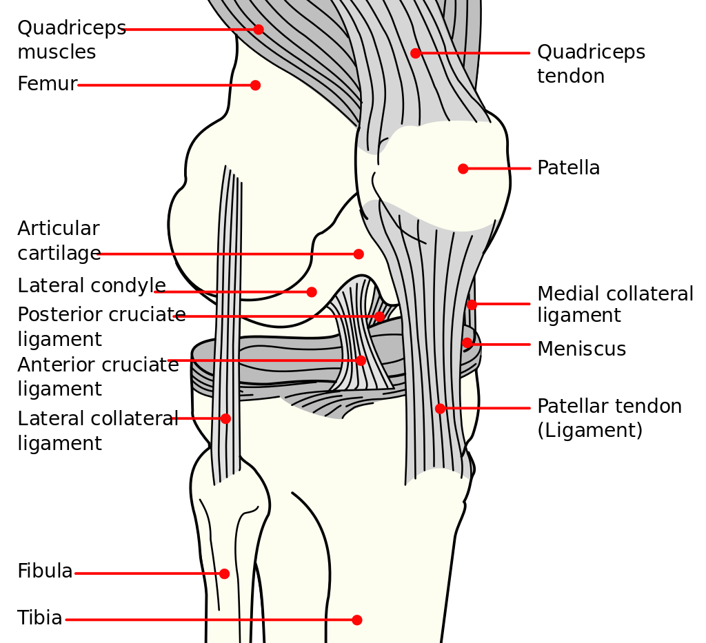 Parem põlv, vaadatuna nurga alt otse ja küljelt.